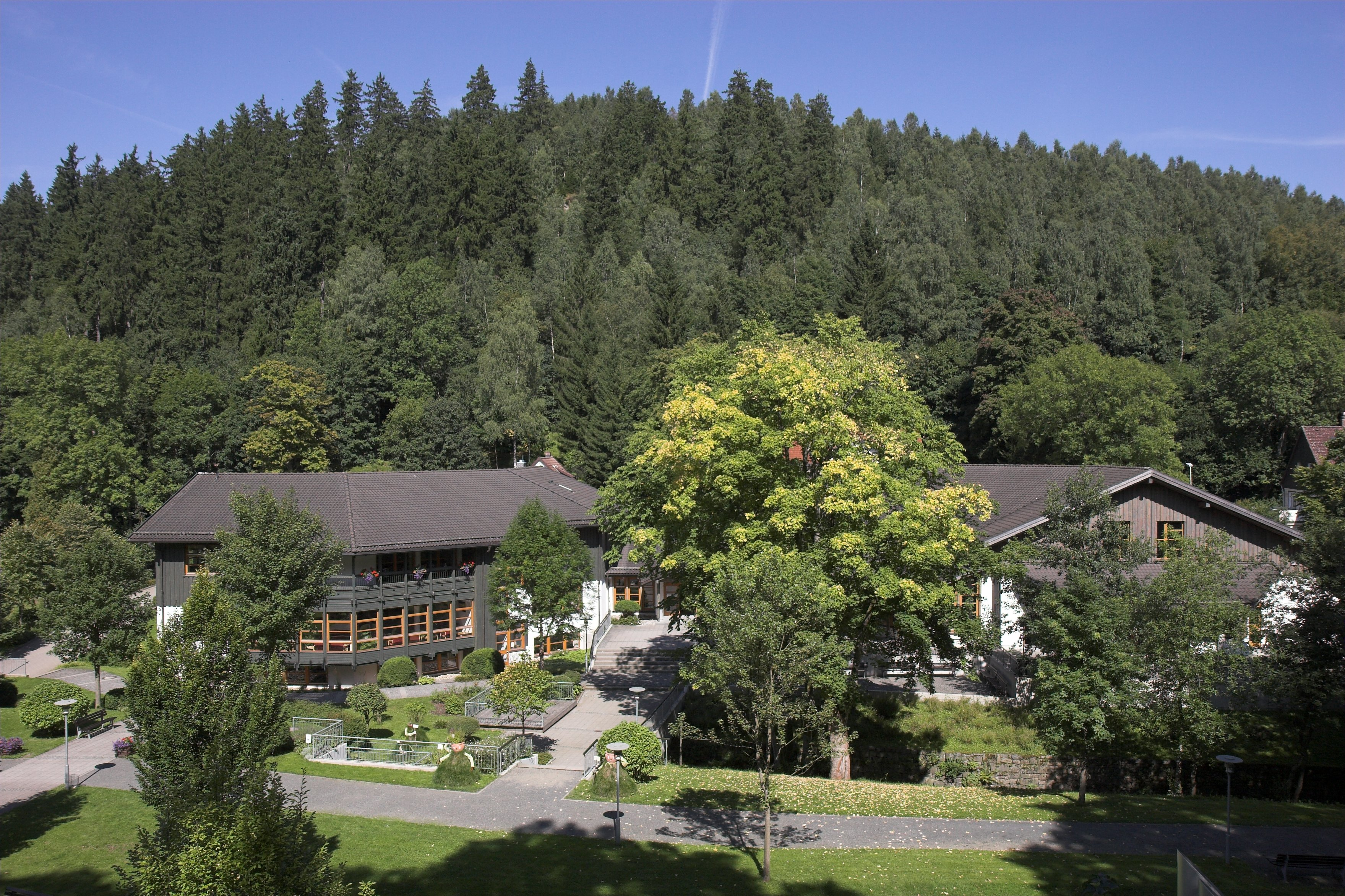 Kurhaus und Kurpark von Altenau